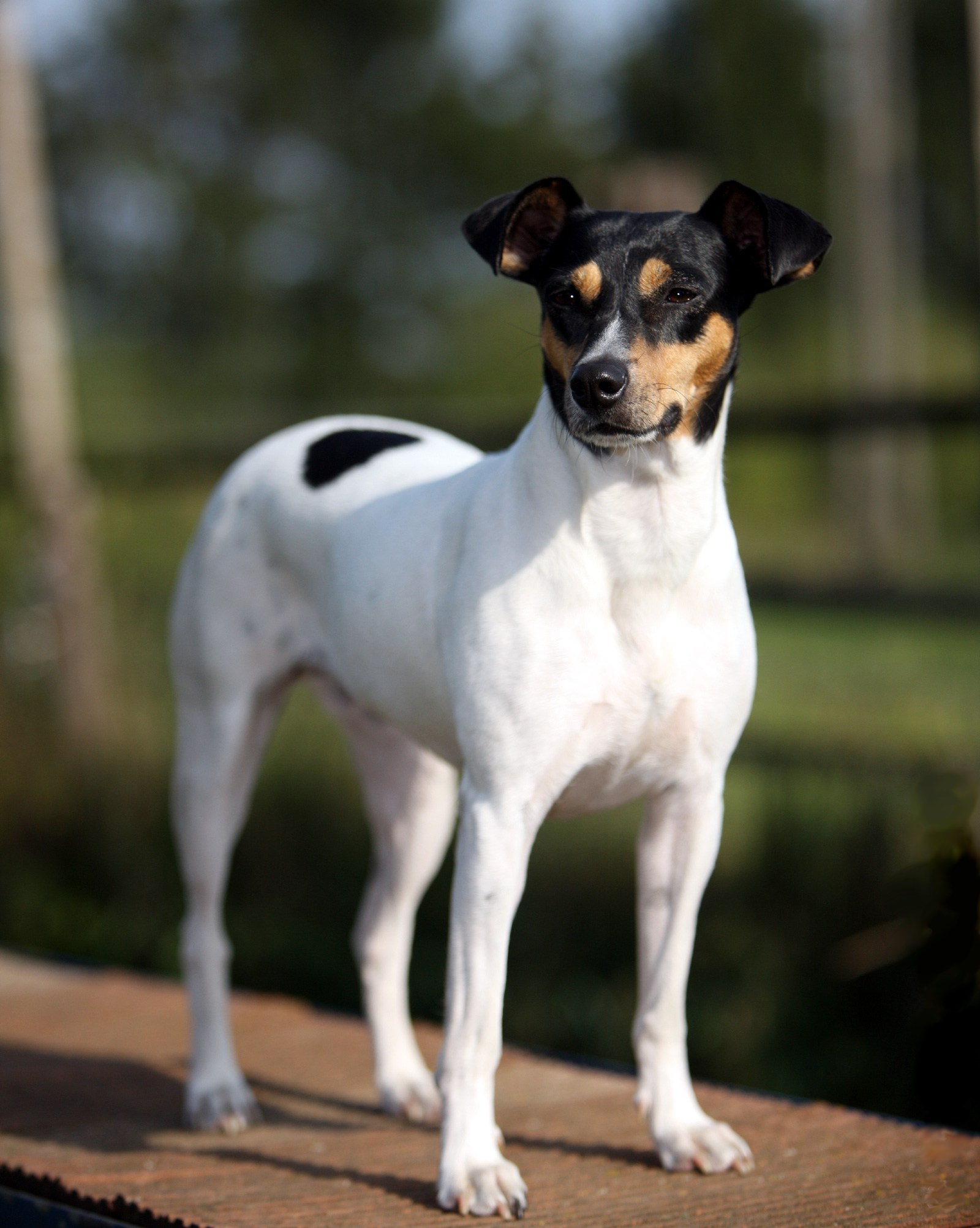 Junge Bodeguero Hündin Jara aus Deutschland